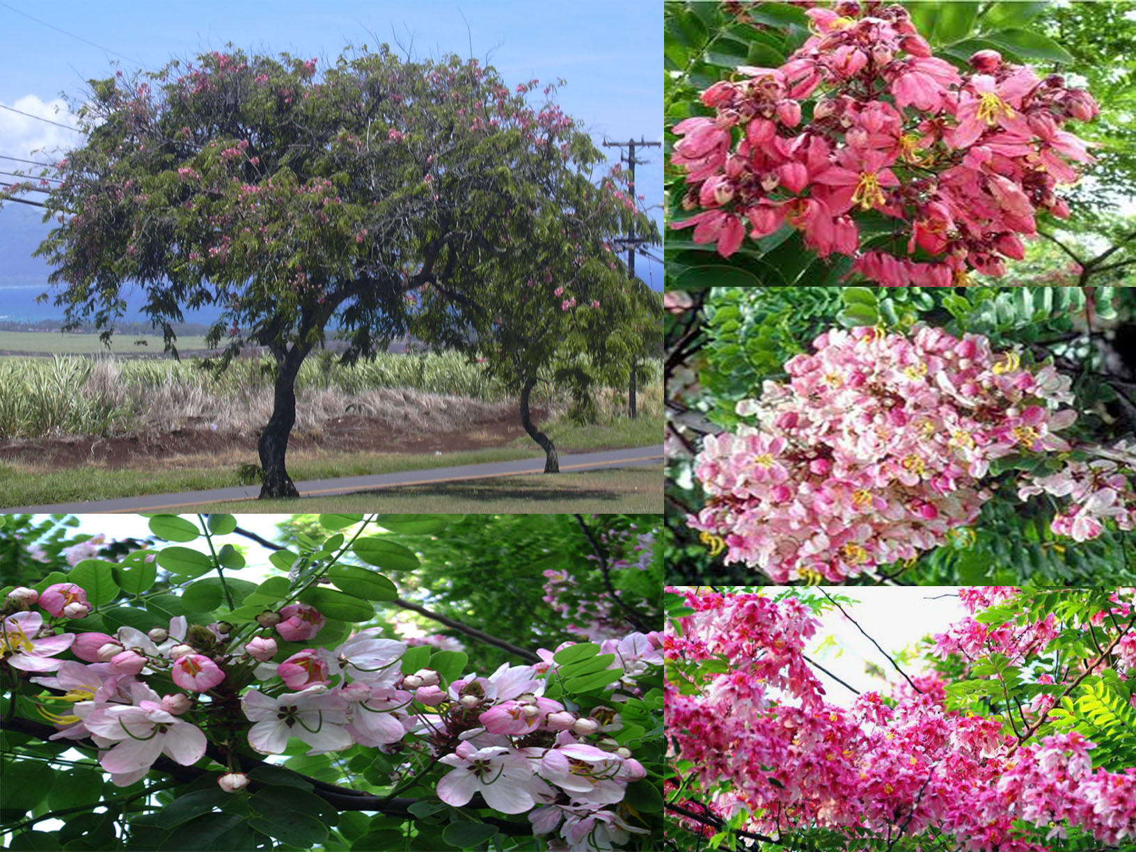 ต้นชัยพฤกษ์นั้นมีสีของดอกตามฤดูกาล